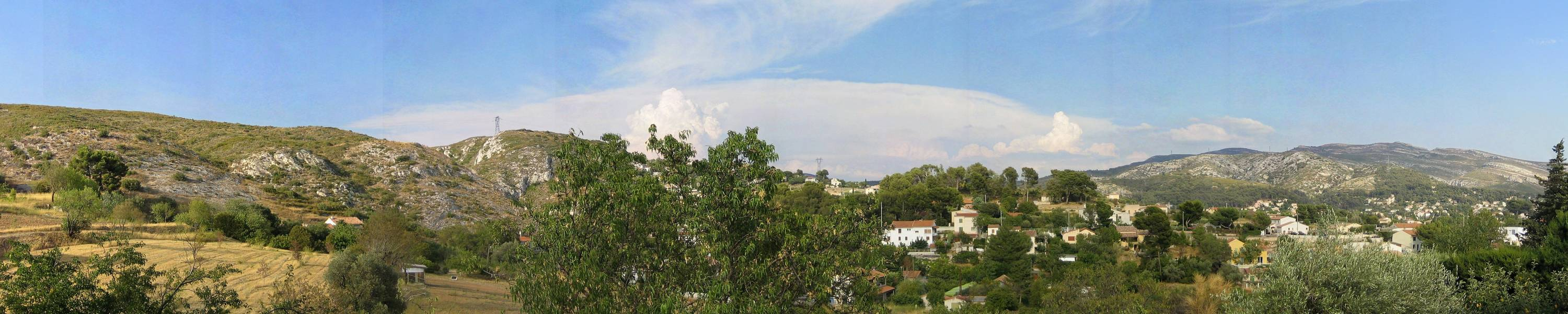 vue panoramique Allauch Description Original size (3000x600) here.Date 21 August 2005, 12:04Source Panoramic-AllauchAuthor SÃ©bastien Bertrand from Paris, France Original size (3000x600) here.